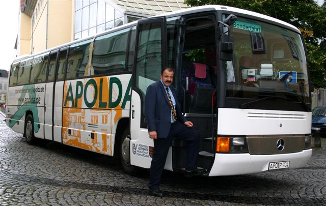 Bus der Apoldaer Nahverkehrsbetriebe